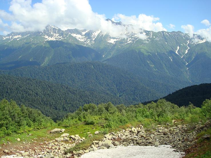 Вид на гору Чугуш с горы Ачишхо. Данный район Западного Кавказа расположен на территории Кавказского государственного природного биосферного заповедника, включённого в список Всемирного наследия